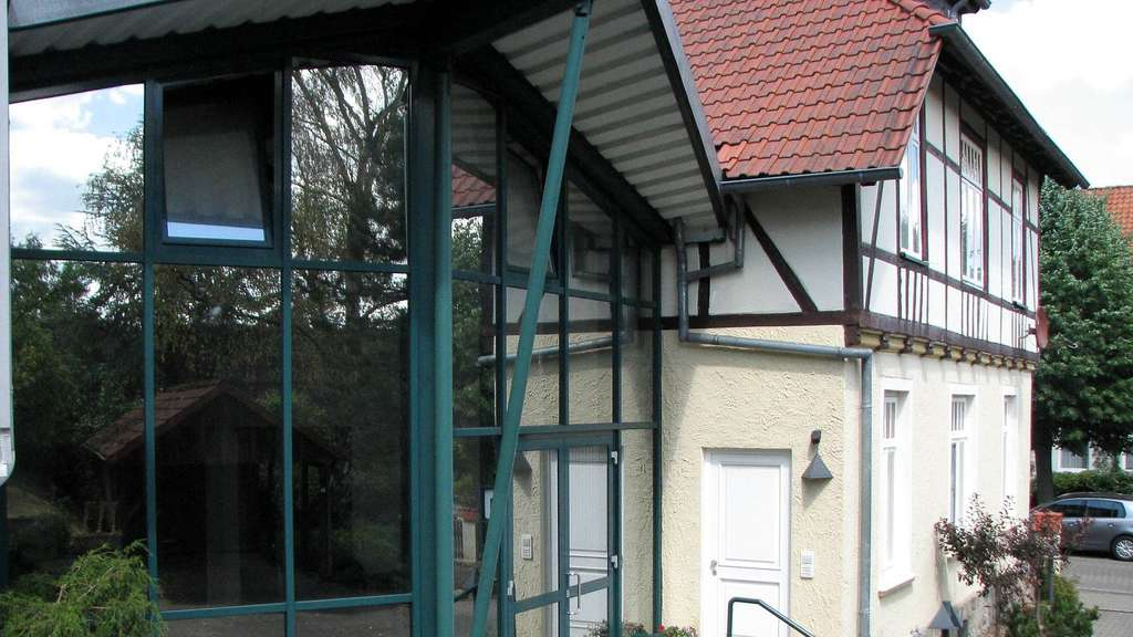 Moderne Architektur des Bürgerhaus Hankensbüttel